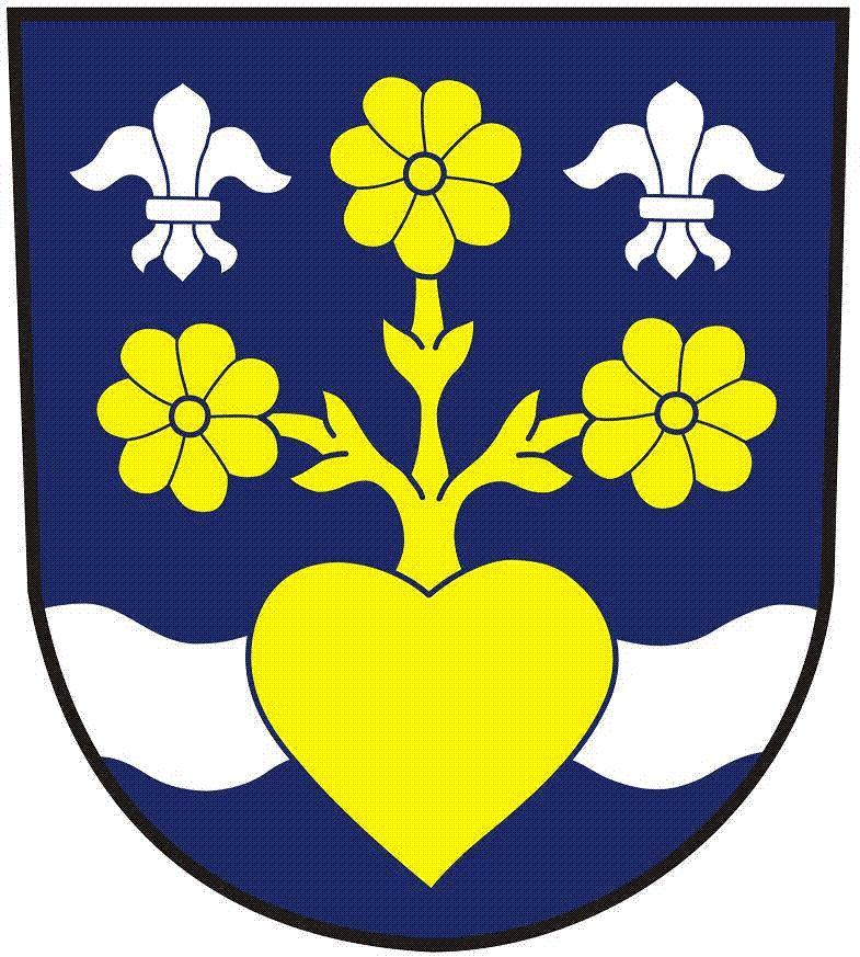 Znak obce Milotice nad Opavou